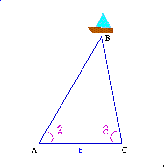 Triangulation